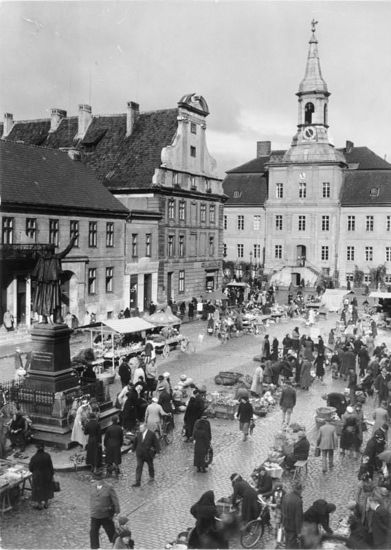 Tilsit (Ostgebiete des Deutschen Reiches unter fremder Verwaltung) Marktplatz mit Rathaus. Im Vordergrund das Schenkendorff-Denkmal Tilsit entstand im 15. und 16. Jahrhundert in Anlehnung an eine 1406 erbaute Ordensburg. Die preussisch-deutsche Geschichte ist mit diesem Namen eng verknüpft. Dorthin floh die preussische Königsfamilie vor Napoleon, wo Königin Luise mit ihm zusammentraf. 1807 wurde hier der Friede geschlossen. Tilsit, an der Memel und der Eisenbahnlinie Insterburg-Memel gelegen, entwickelte sich zu einem ansehnlichen Umschlaghafen, hatte Maschinenbau und landwirtschaftliche Industrien (Tilsiter Käse). Durch Abtrennung des Memel-Gebiets 1919 erlitt die Stadt schweren wirtschaftlichen Schaden. Seit 1945 steht die teilweise zerstörte Stadt unter sowjetrussischer Verwaltung.